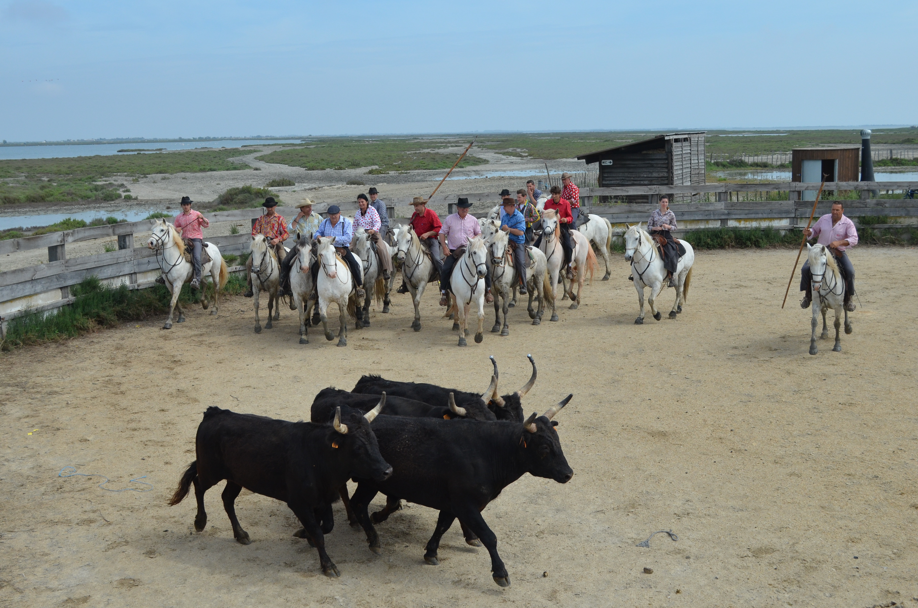 Taureaux et gardians de la manade Aubanel Baroncelli, dans le bouvaou Henri Aubanel, aux Saintes-Maries-de-la-Mer.